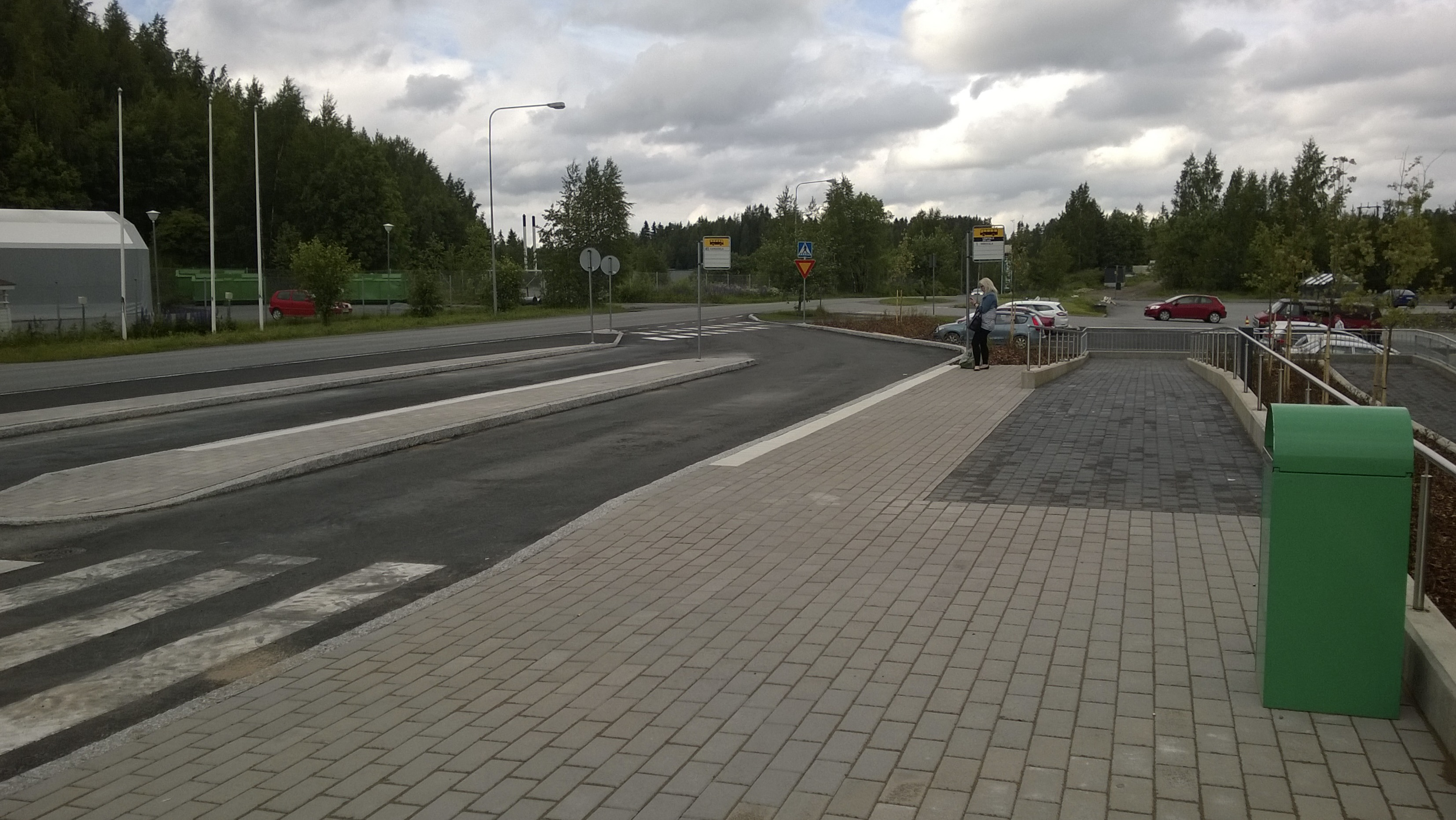 Kangasalan Prisman edustalla oleva, kesällä 2015 valmistunut pienehkö kaksilaiturinen Vatialan joukkoliikenneterminaali. Se on runkolinja 1:n päätepysäkki, jossa siltä on vaihtoyhteys linjalle 45.